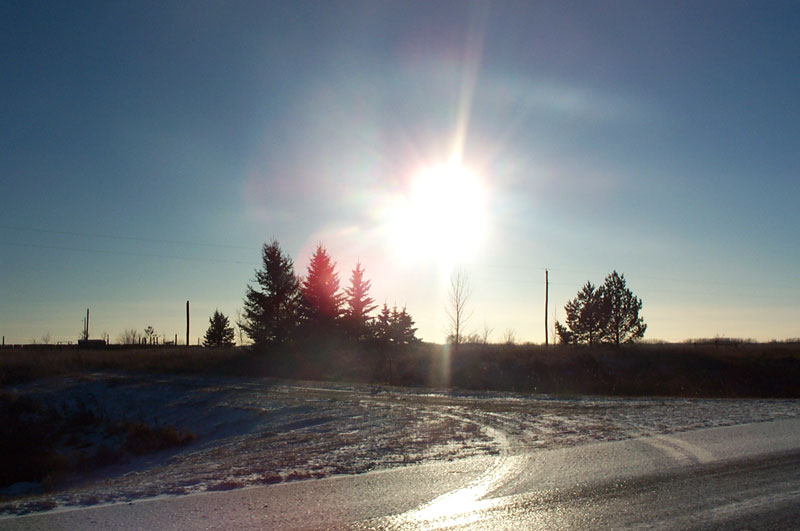 Dugdale, Minnesota